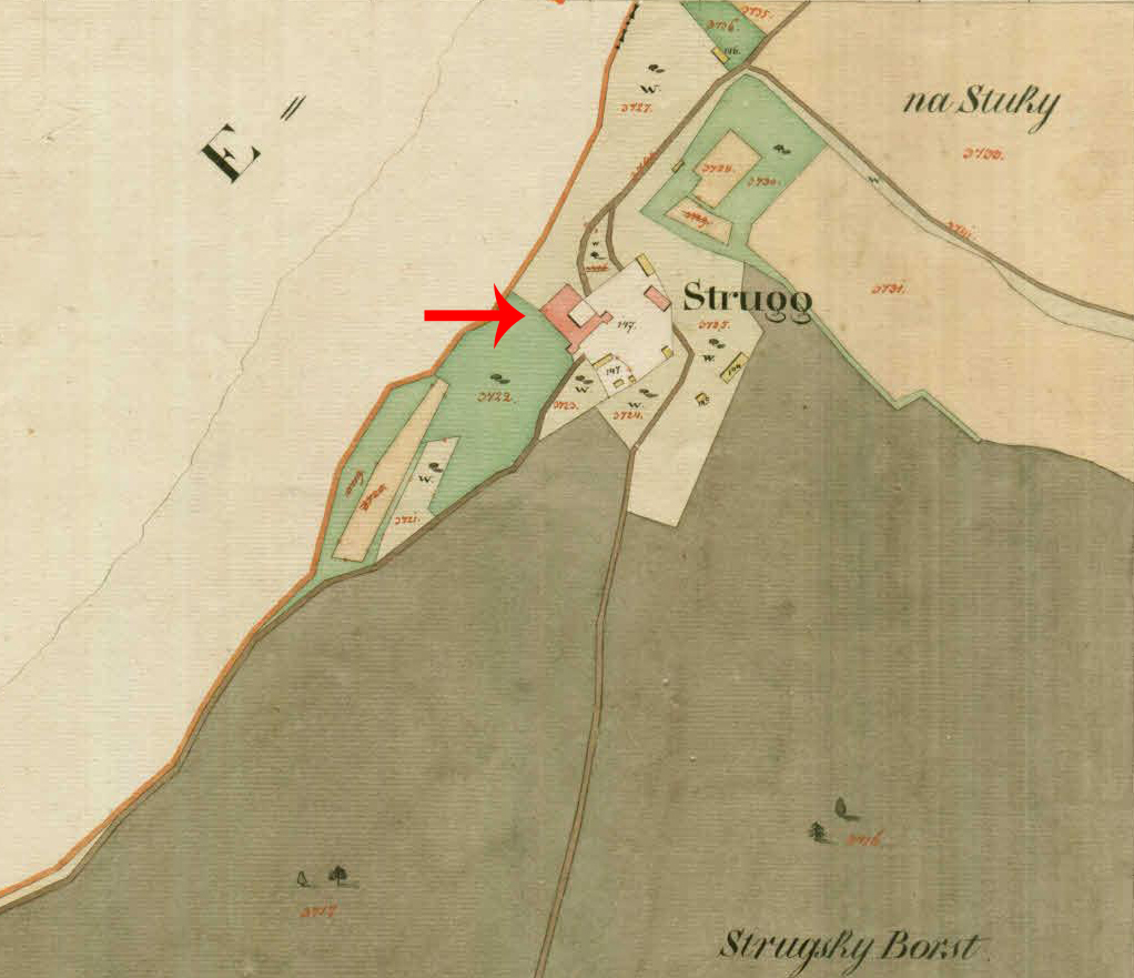 Franciscejski kataster za Kranjsko, 1823-1869